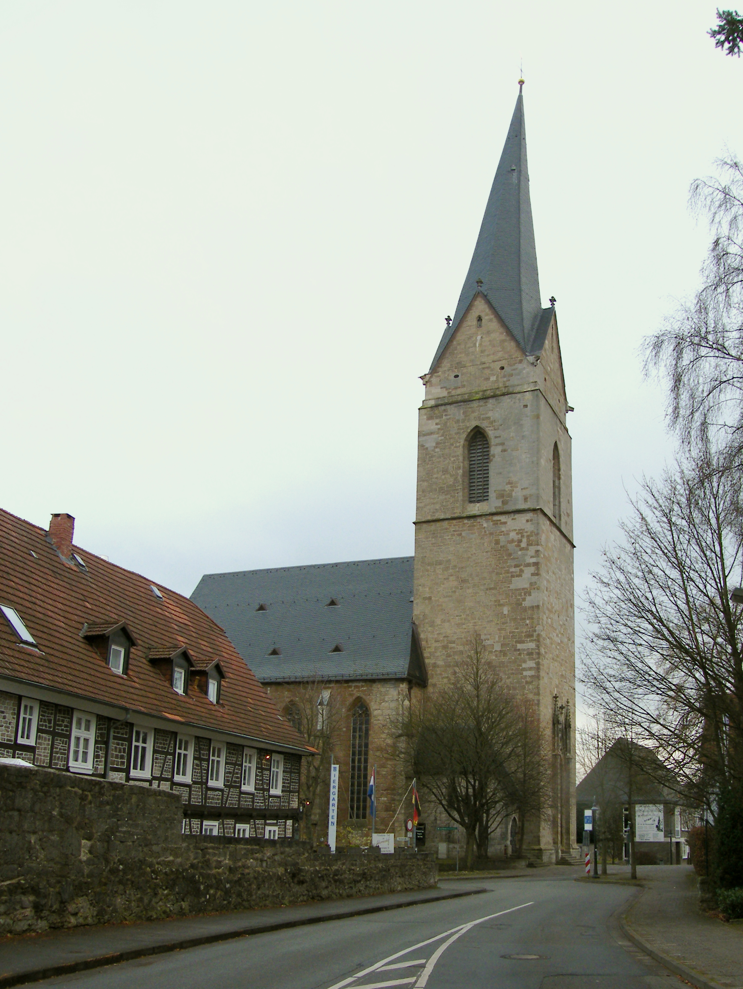 Korbach - Nikolaikirche - 1359 wurde der Turm errichtet. Das Schiff und der Chor wurden erst 100 Jahre später errichtet und gegen 1460 vollendet.